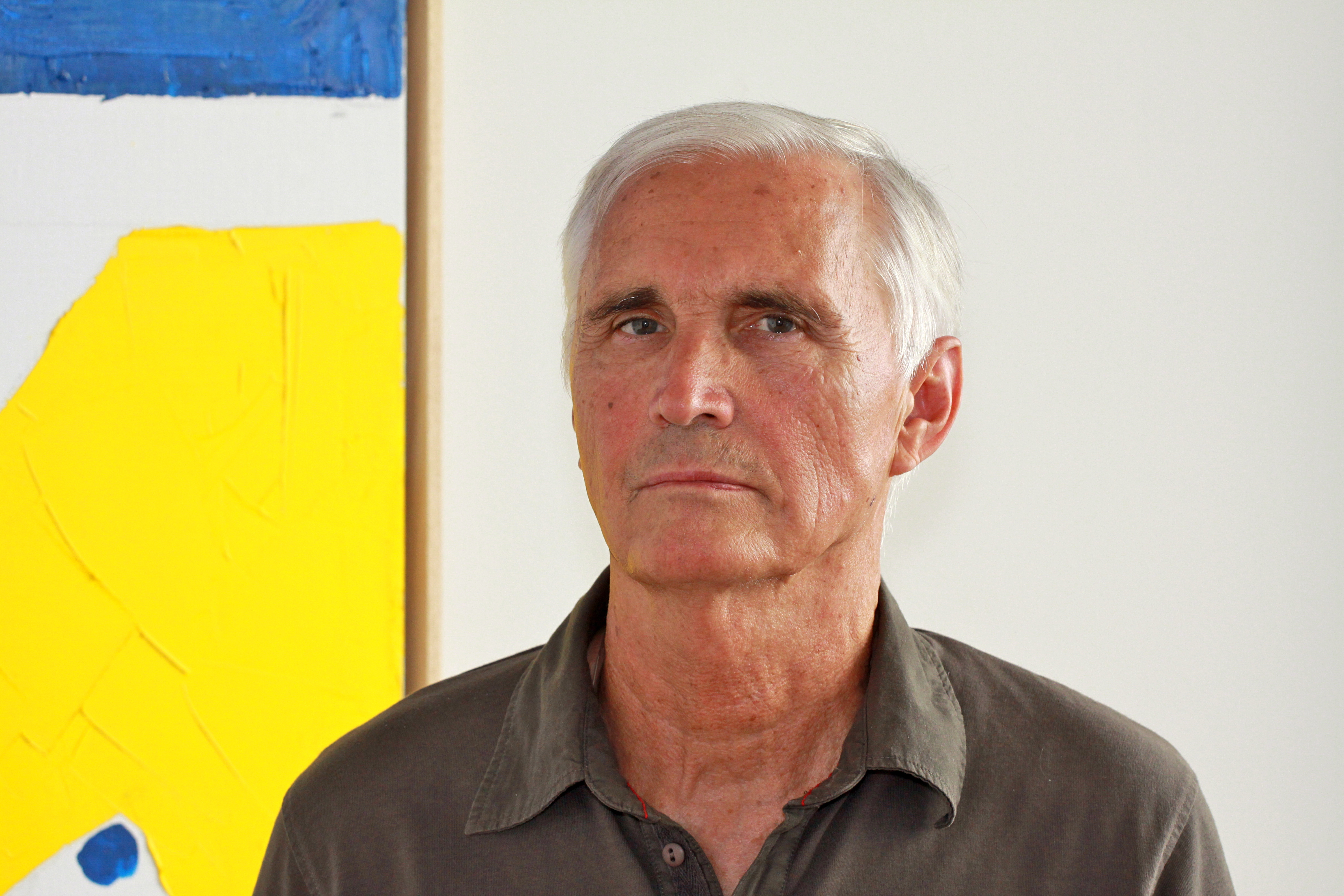 Waleri Iwanowitsch Jurlow (auch Valery Yurlov, russ. Валерий Иванович Юрлов), Vertreter des Russischen Nonkonformismus.